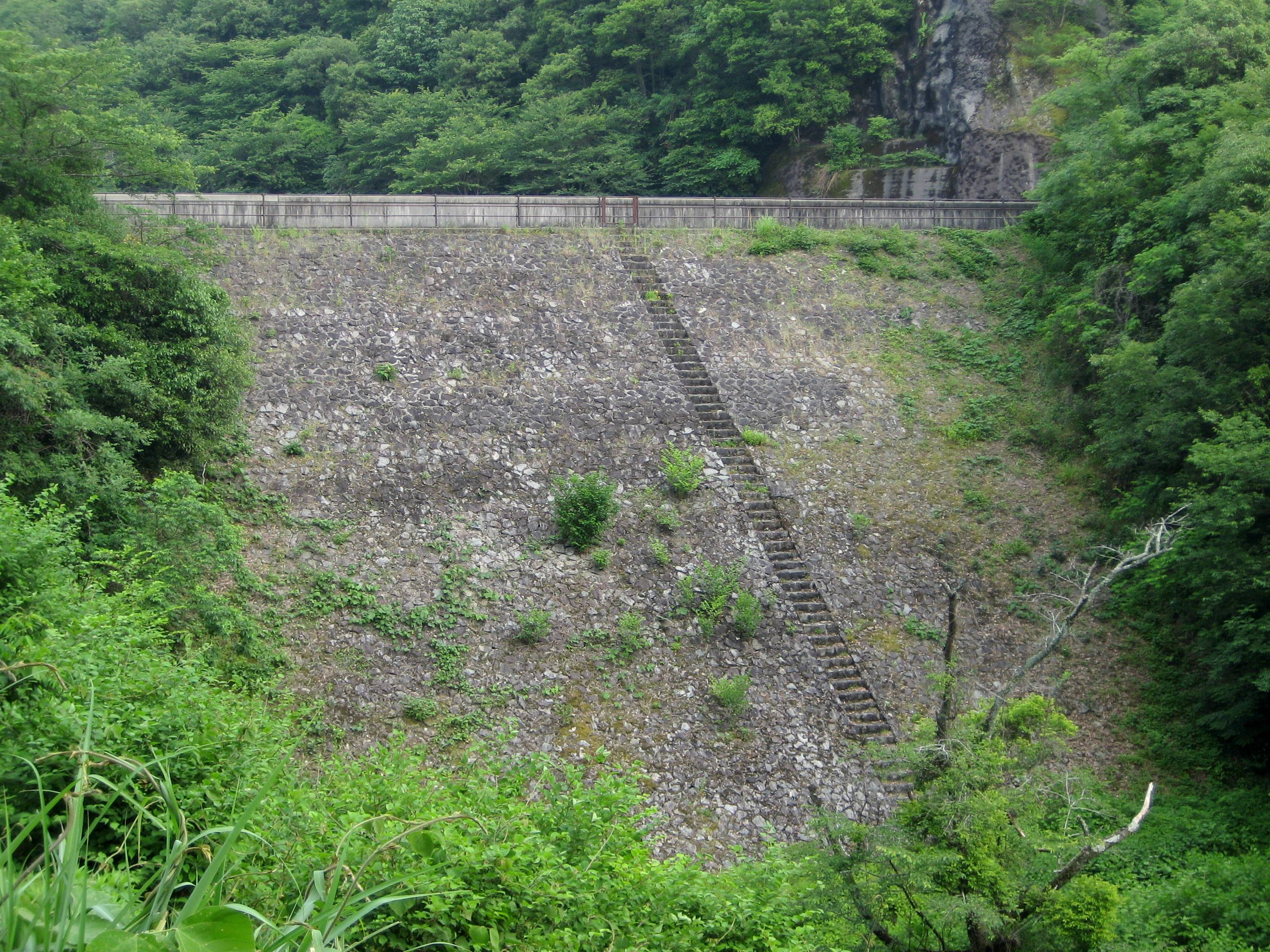 Kobuchi Dam (小渕ダム)